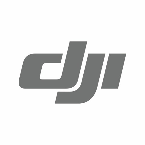 Toto je logo firmy DJI